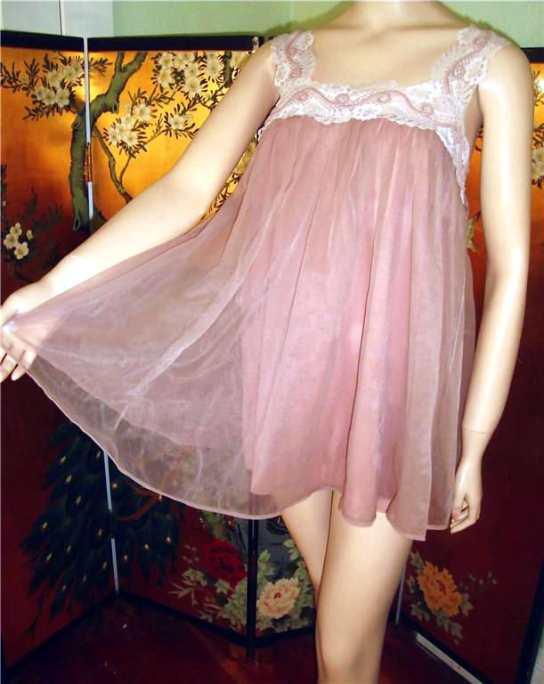 Pink filmy babydoll